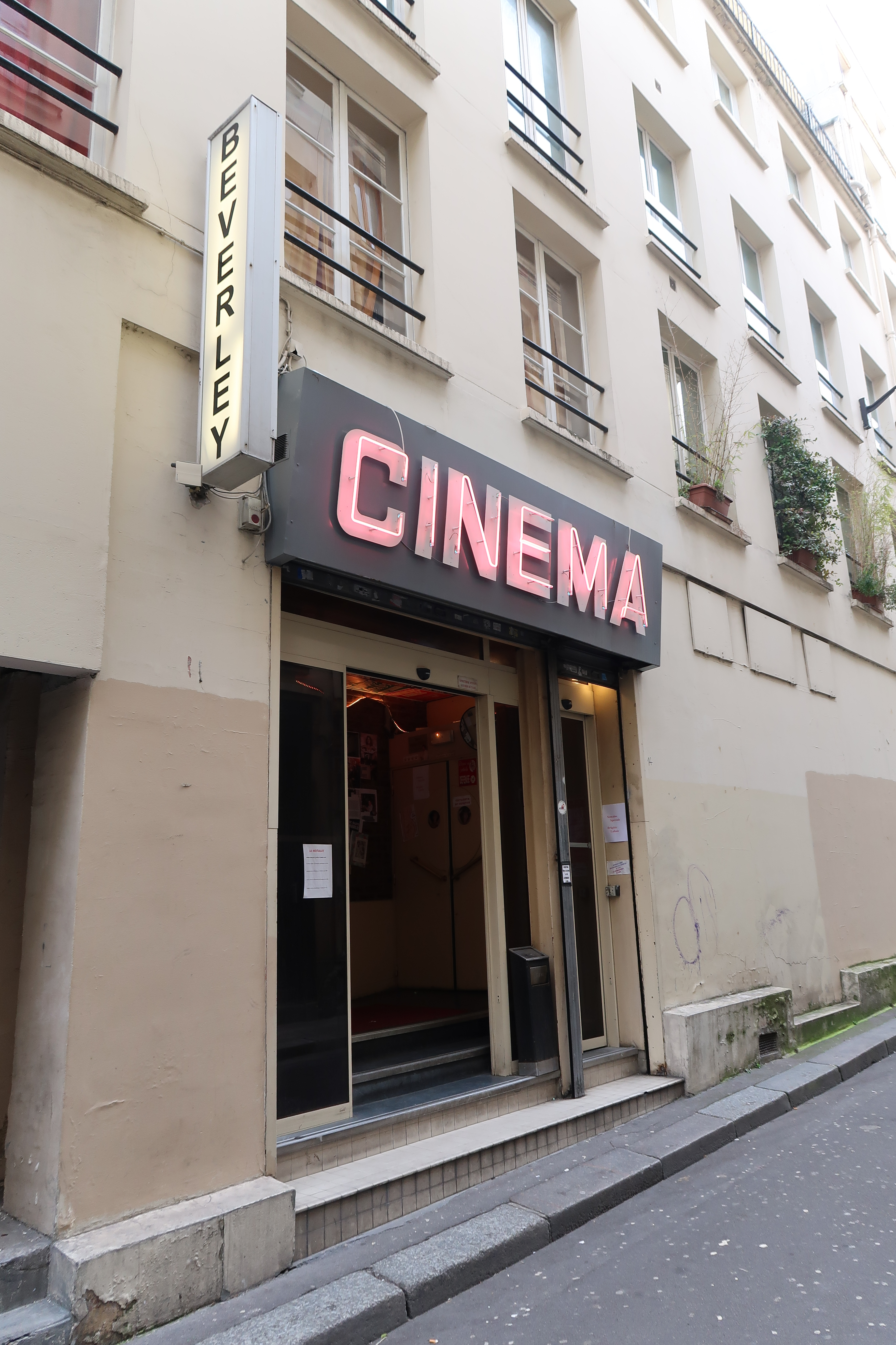 Cinéma Le Beverley, 14 rue de la Ville-Neuve (Paris, 2e).